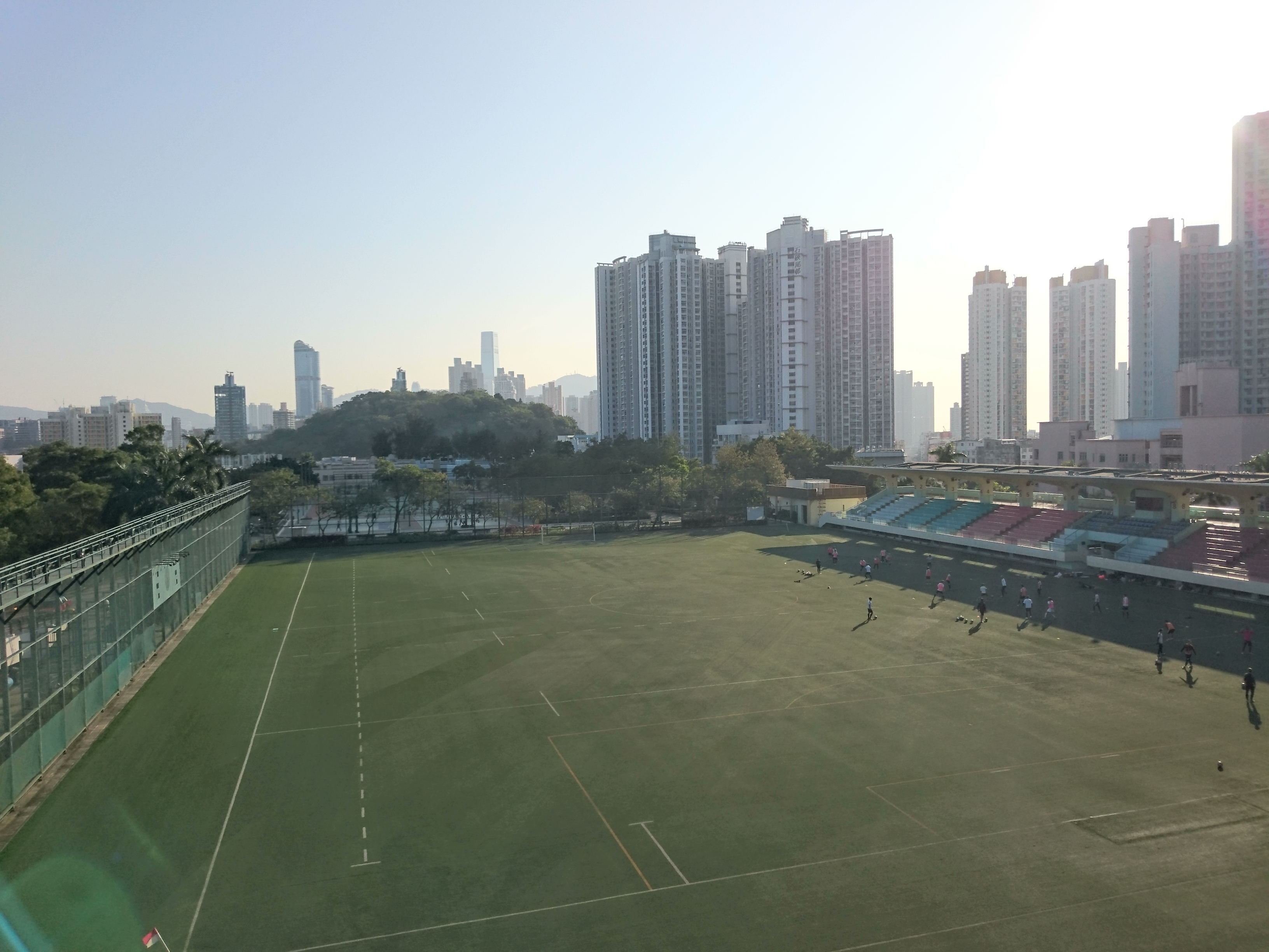 Hong Kong